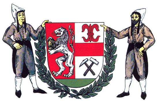 Loučná pod Klínovcem znak